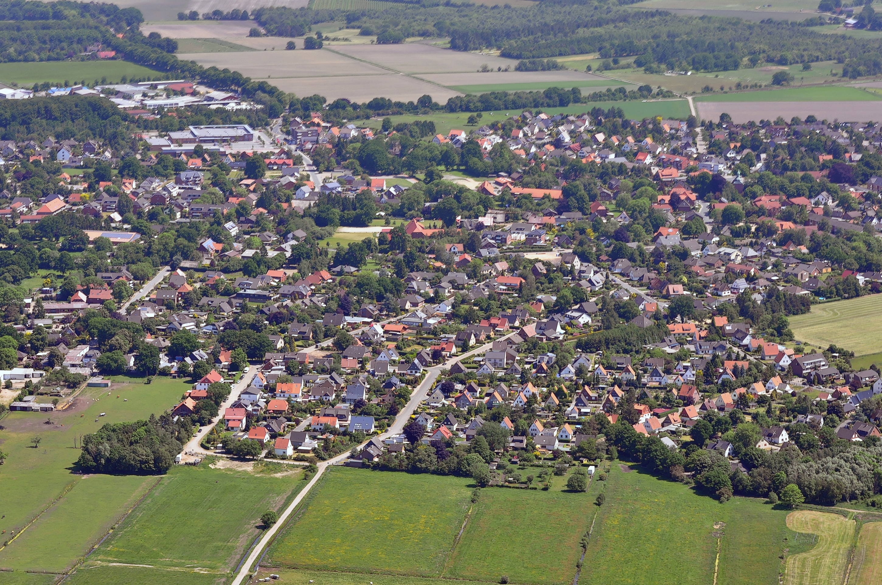 Luftbilder von der Nordseeküste 2012-05: Loxstedt